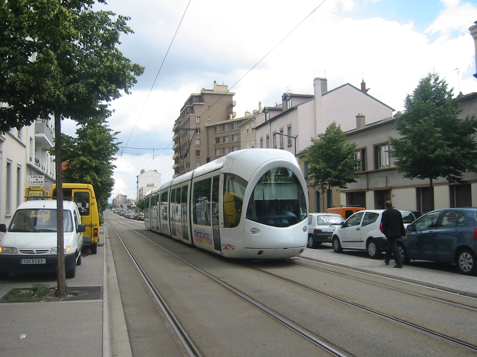 Tramway de Lyon (Avenue Berthelot, angle rue du Repos) (T2).